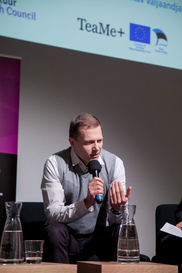 Andi Hektor 2016. aasta teaduskommunikatsiooni konverentsil.